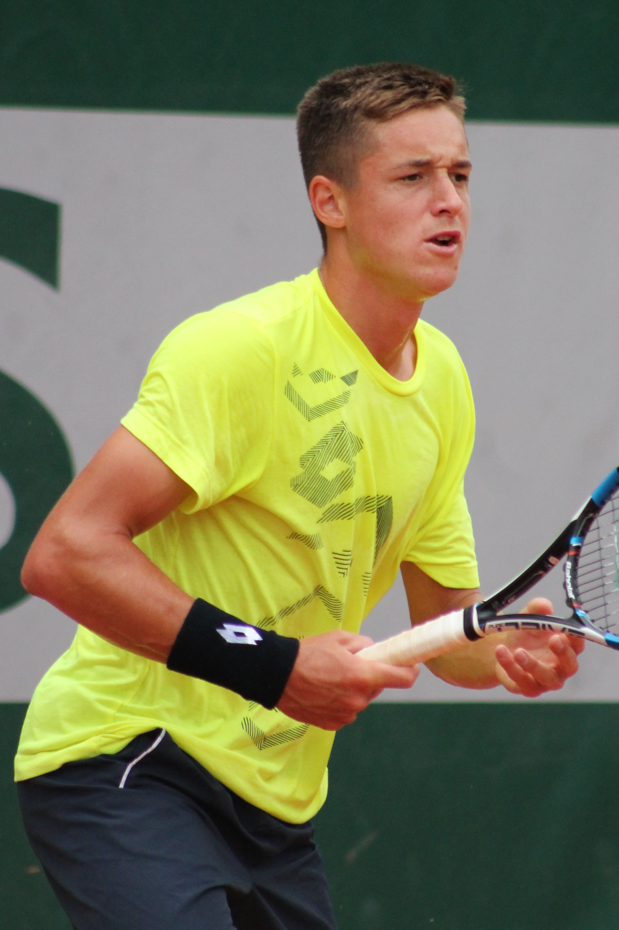 Caruana RG16 (4)